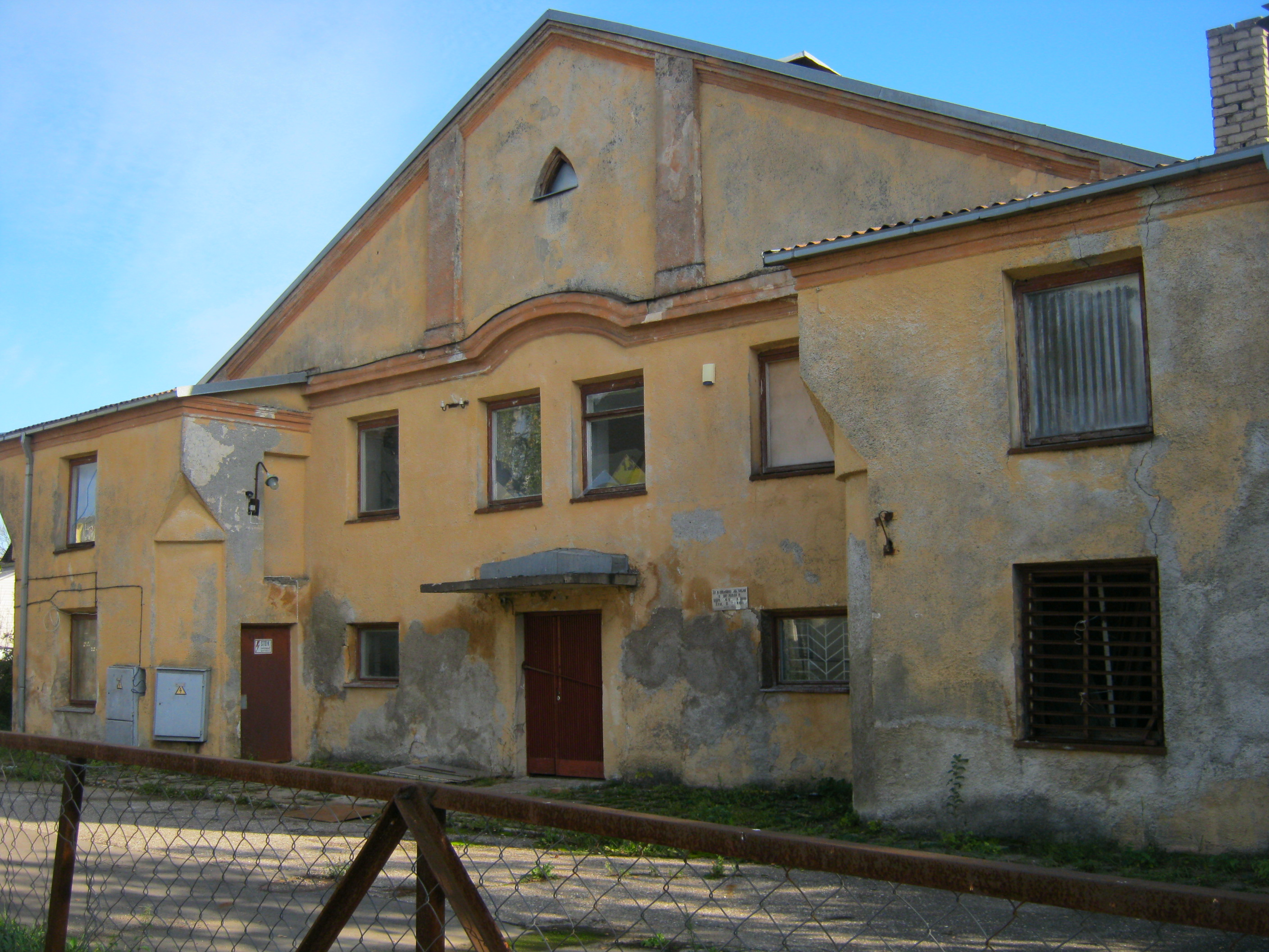 Jonava